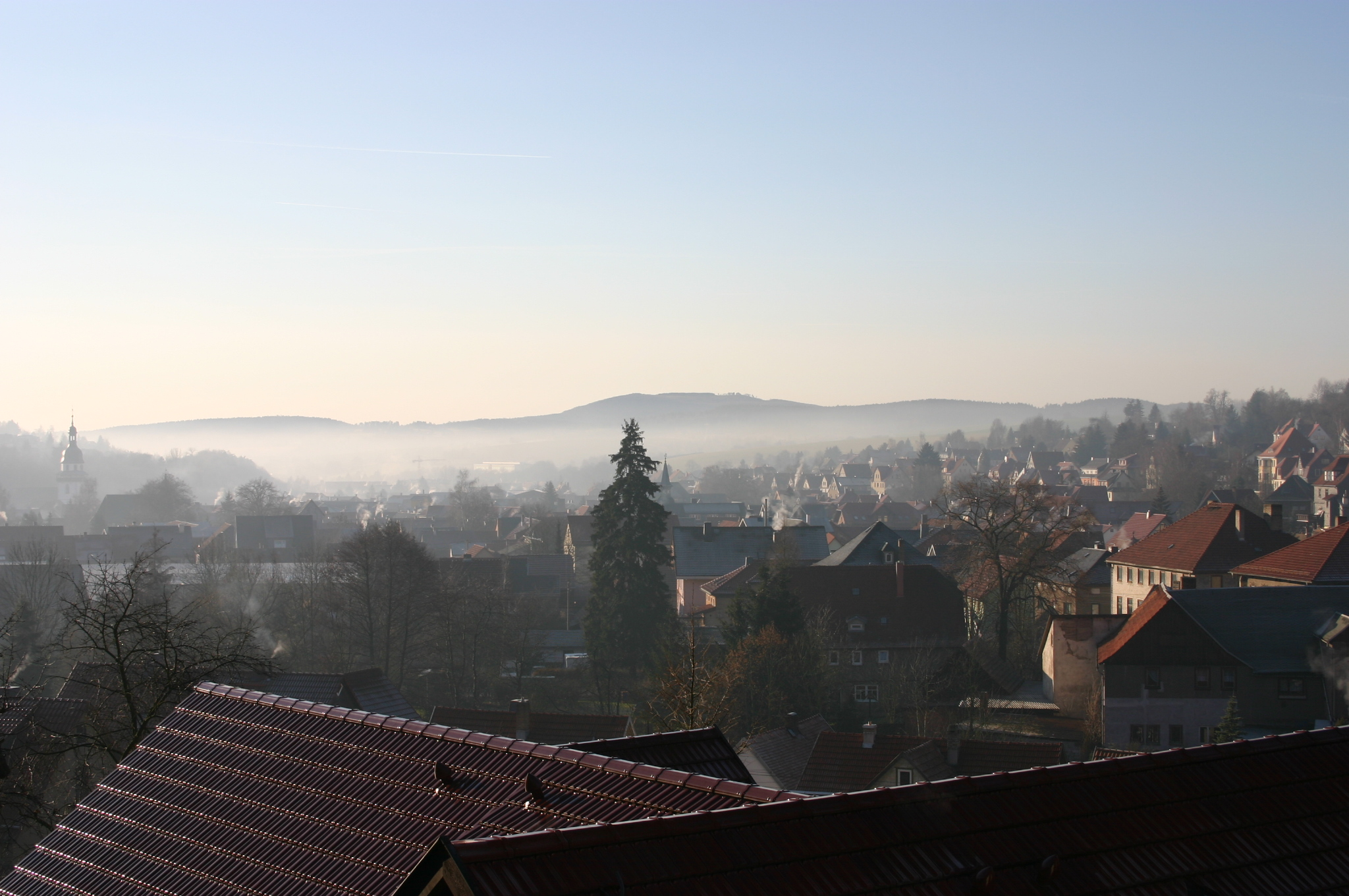 Blick auf Steinbach-Hallenberg vom Schloßberg